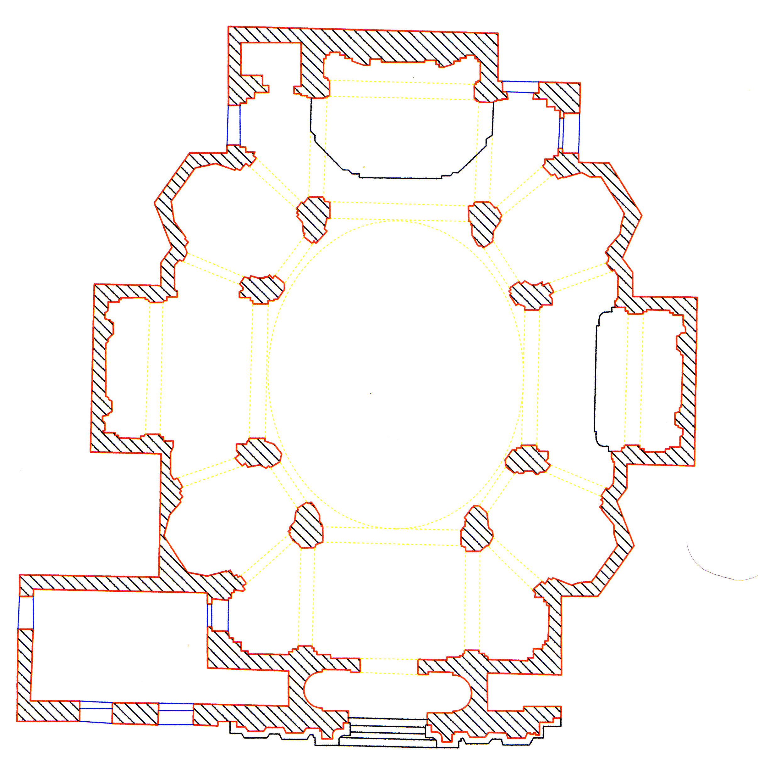 Chiesa di Santa Maria della Concezione a Montecalvario:Plan